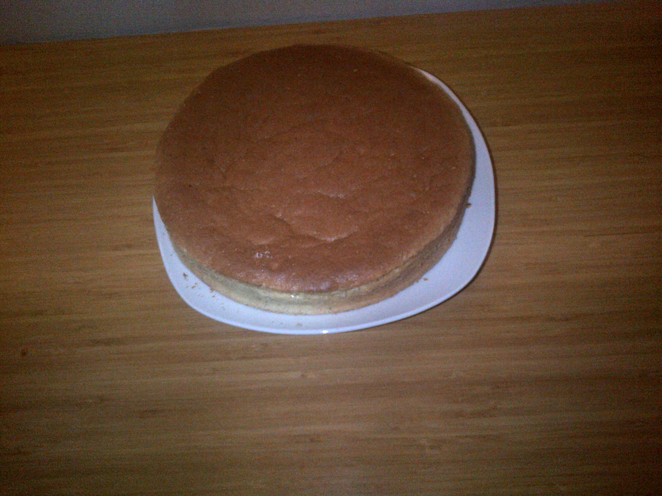 Pandispanya, un bizcochuelo turco.